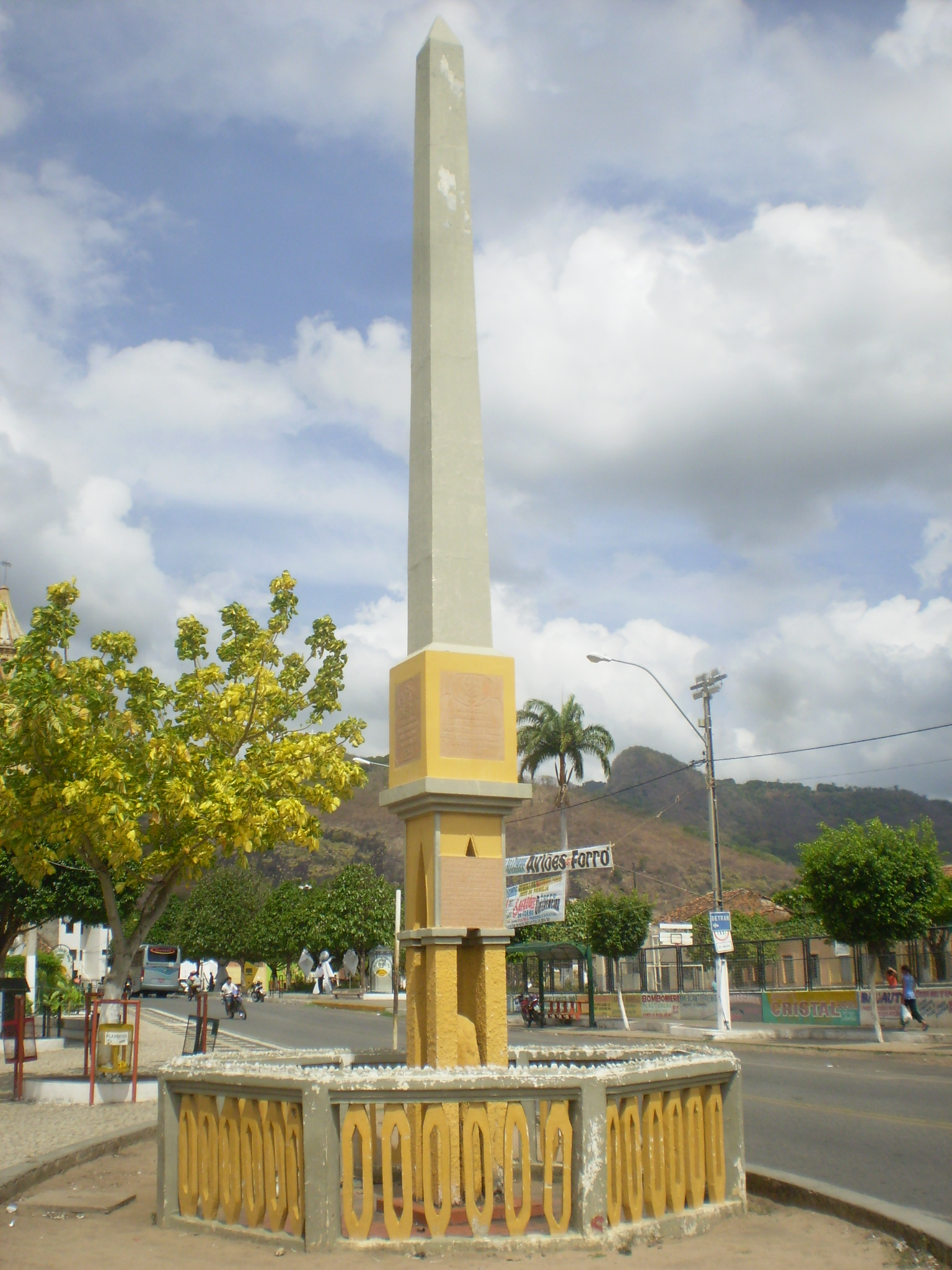 monumento erguido apos fundacao da cidade de baturite